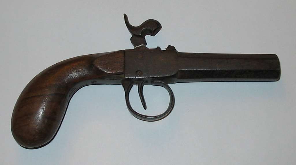 un pistolet fin du 18è siècle